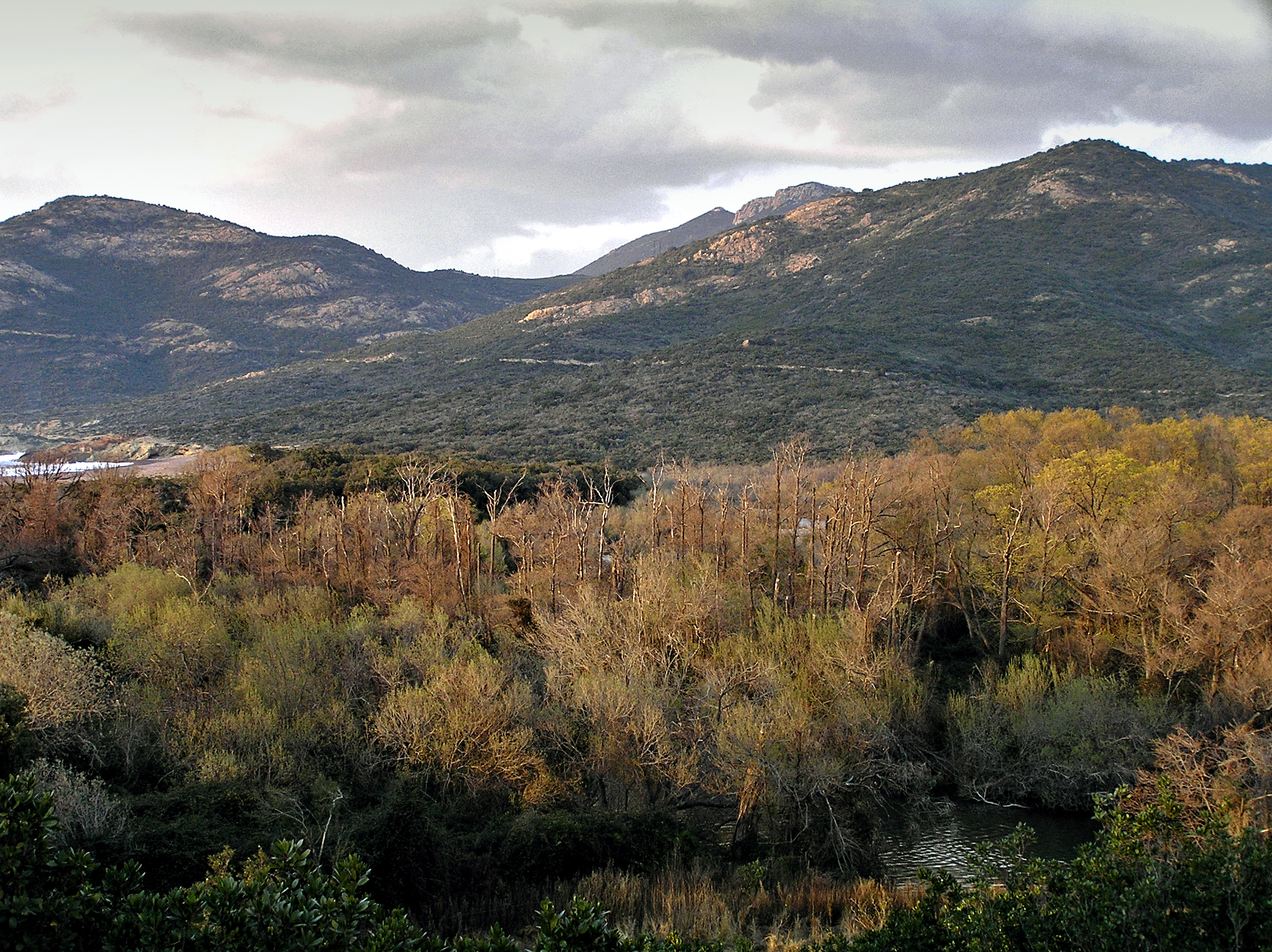 Galéria, Balagne (Corse) - Le delta du Fango avec son important boisement hygrophile (ripisylve à aulnes, présence de saules)